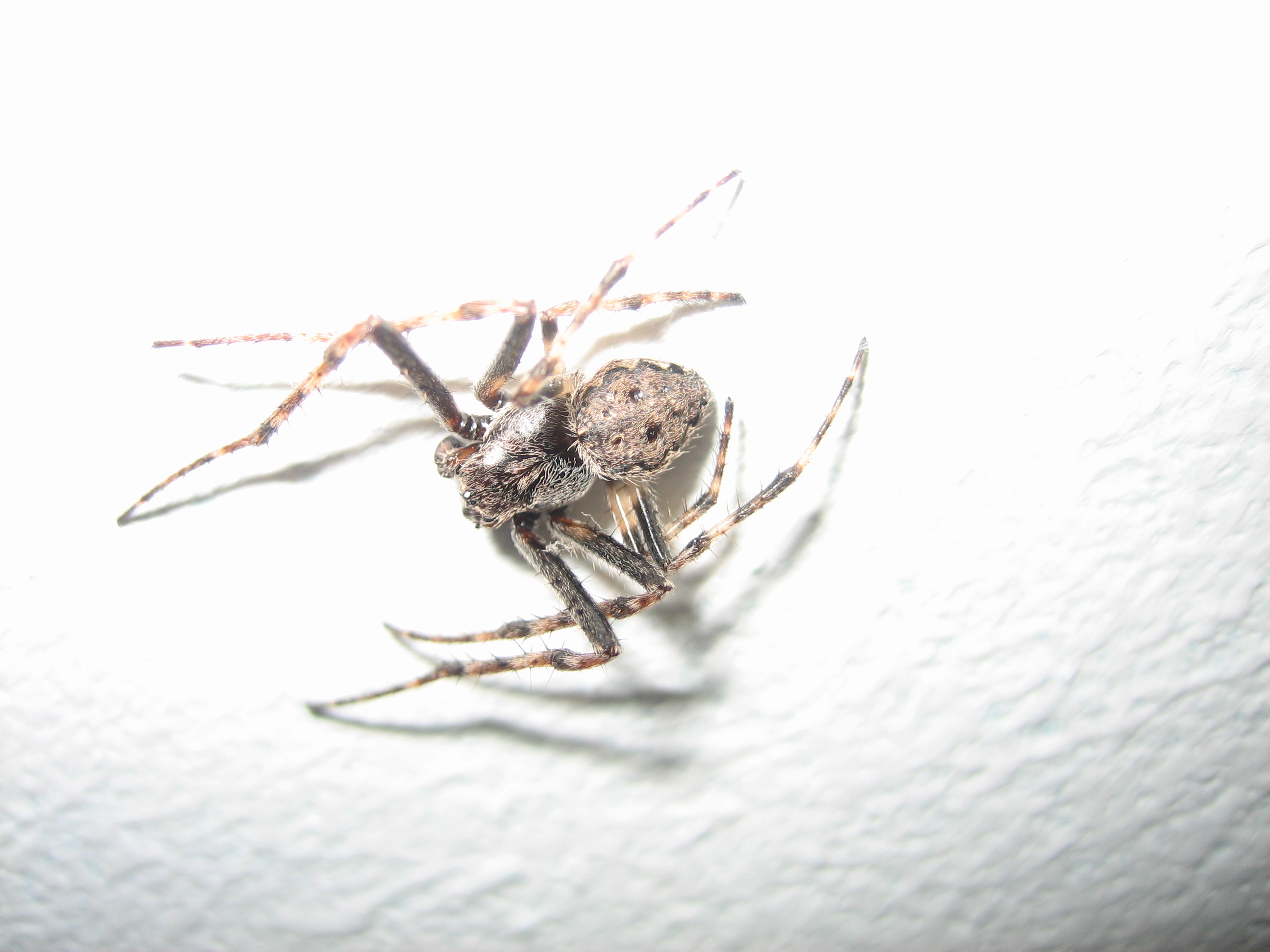 Eine wildlebende Spinne zu Gast im Haus Autor(en): Viktoria Erfurt Bildbeschreibung: Spinne Nachbearbeitete Version